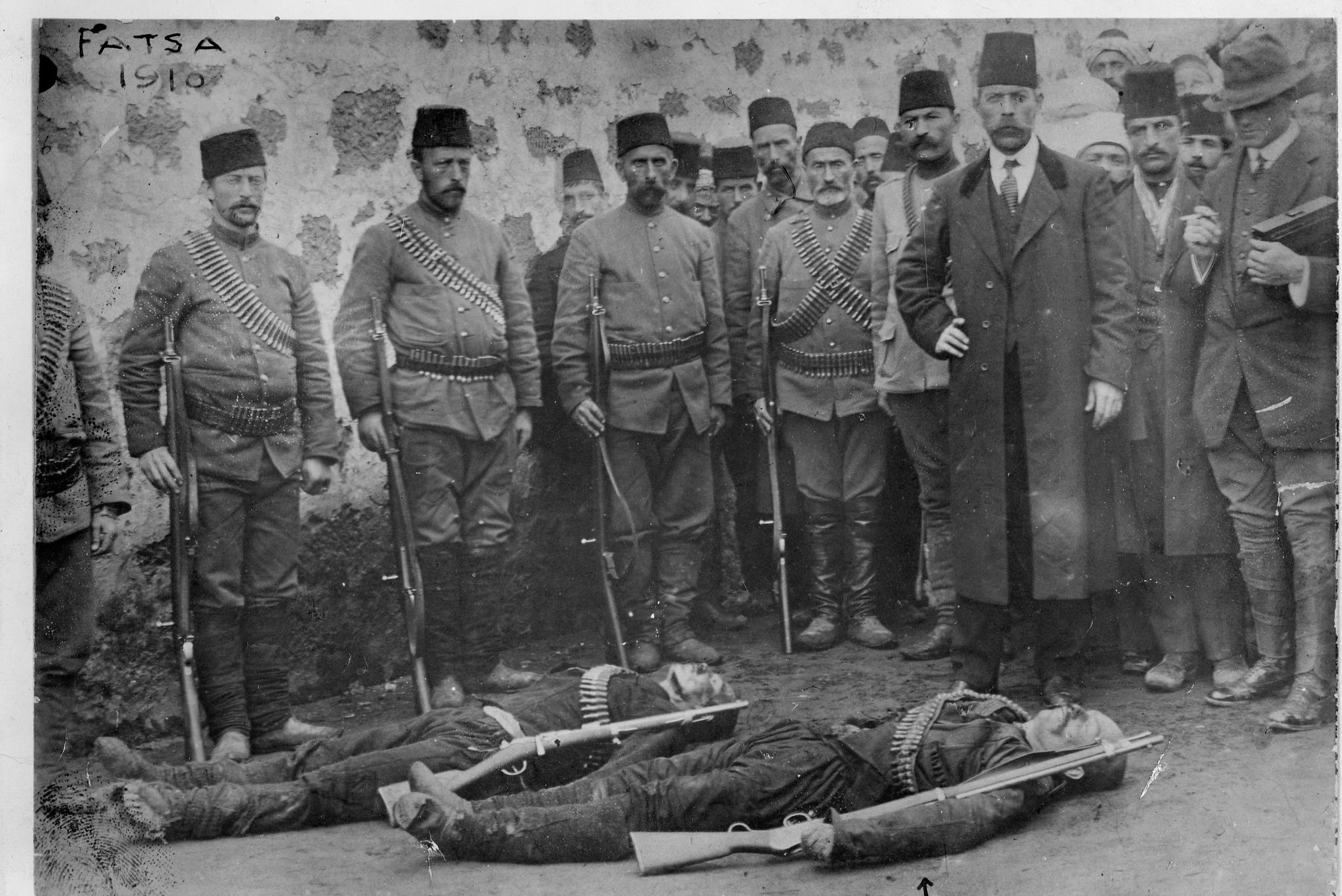 Hekimoğlu olayını araştırmaya gelen ABD'li bir gazetecinin makinesinden çekilen fotoğraf. Öldürülen Hekimoğlu yerde önde yatıyor.